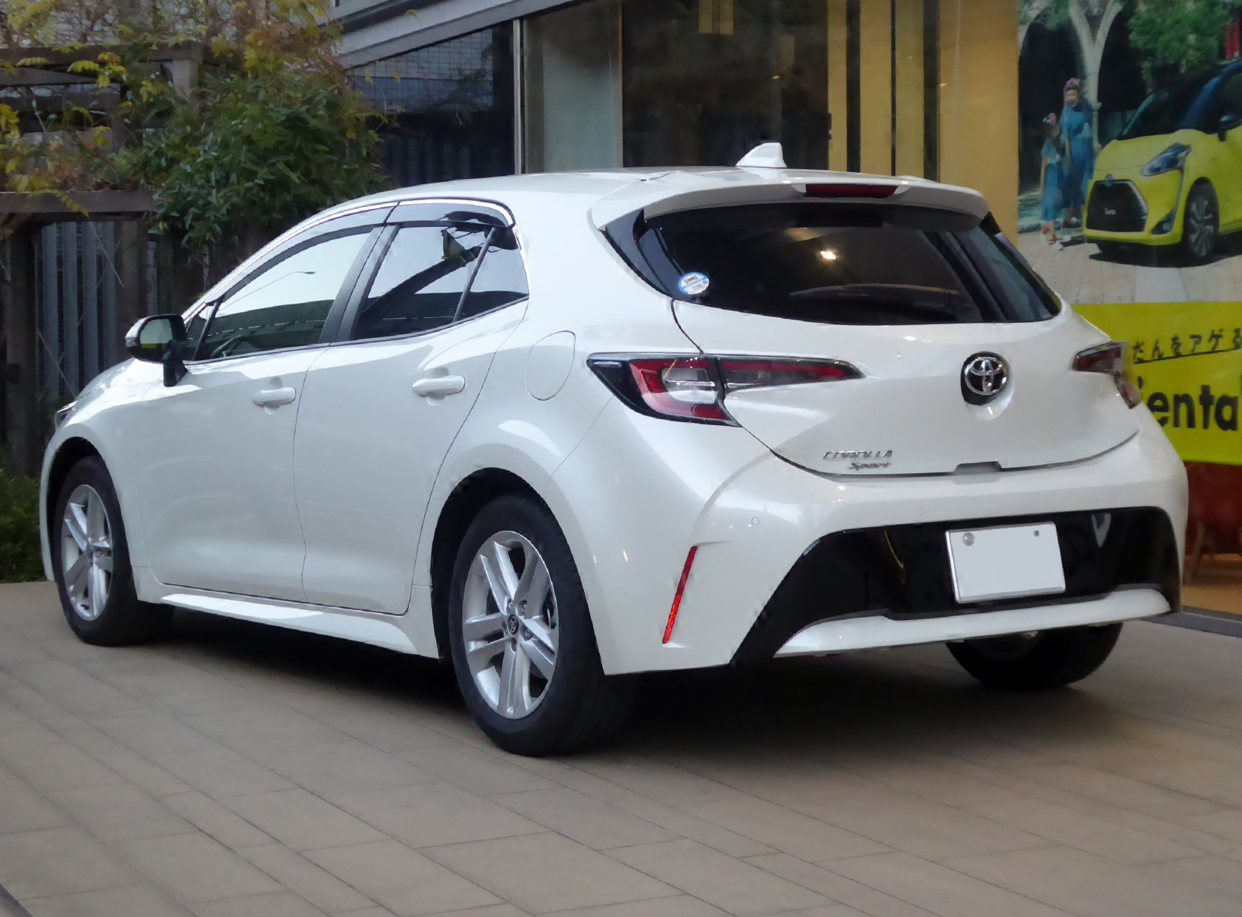 3BA-NRE210H-BHXNZ型トヨタ・カローラスポーツG 2WDをリアから撮影。